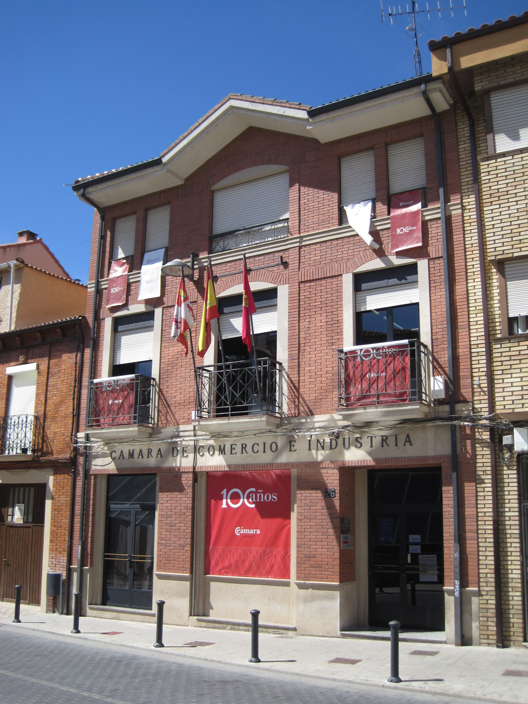 Sede de la Cámara de Comercio e Industria de Astorga (León, España).